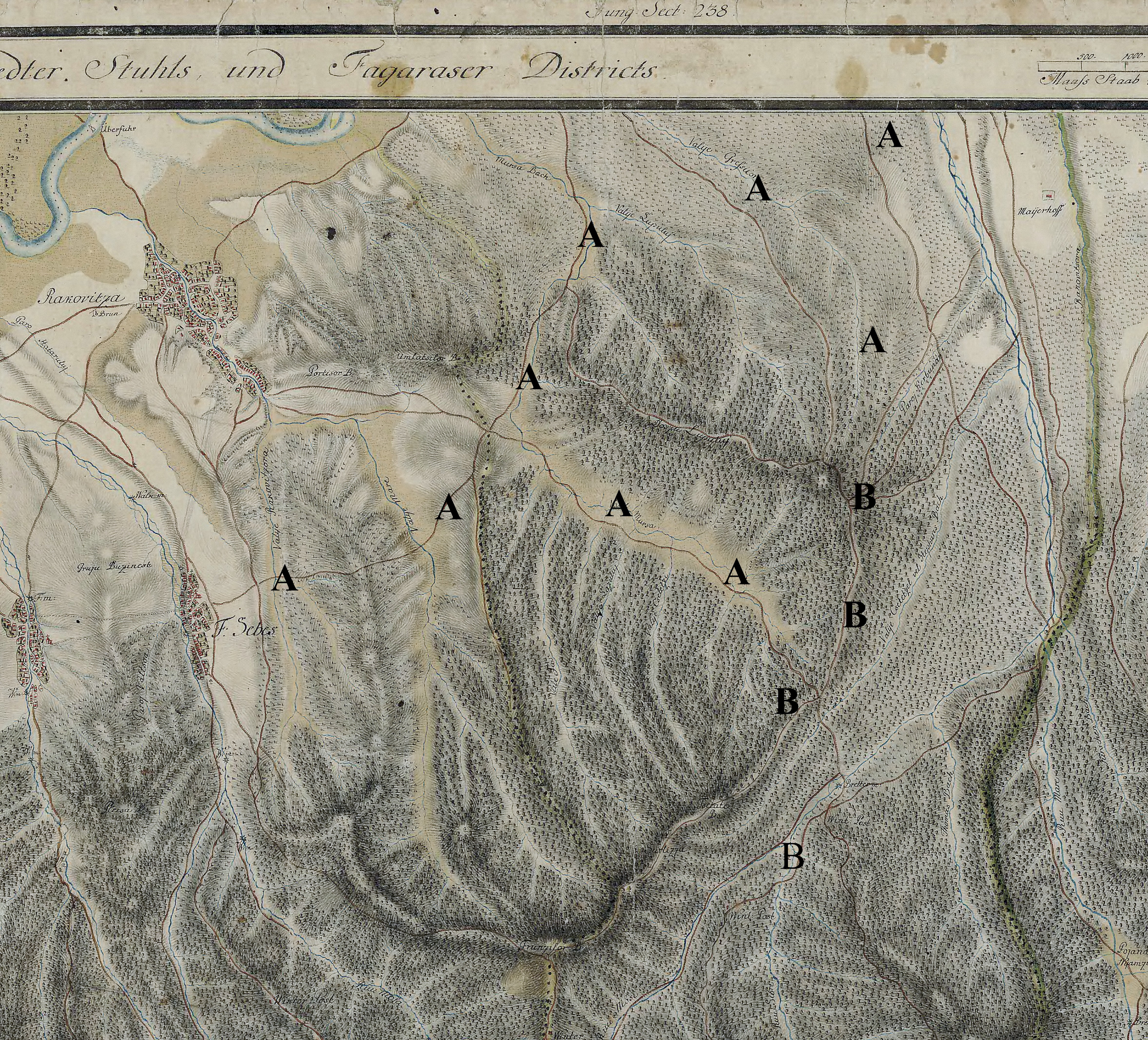 Trasee de acces la fortificaţia medievală de la Avrig-Racoviţa. Indicaţia notată cu A semnifică drumuri de acces cu infrastructură de tip drum forestier, iar cele notate cu B reprezintă acces prin pădure pe drumuri nemarcate şi neamenajate. Punctul terminus al indicaţiilor îl reprezintă locaţia denumită Tsetate Berg aflată pe culmea dealului între B aldin şi B normal, ultimul arătând drumul forestierilor actuali care ocolesc înălţimea de 846m unde se află cetăţuia.